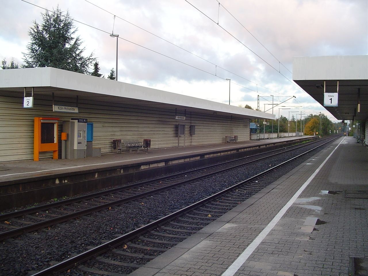 S-Bahnstation Köln-Holweide